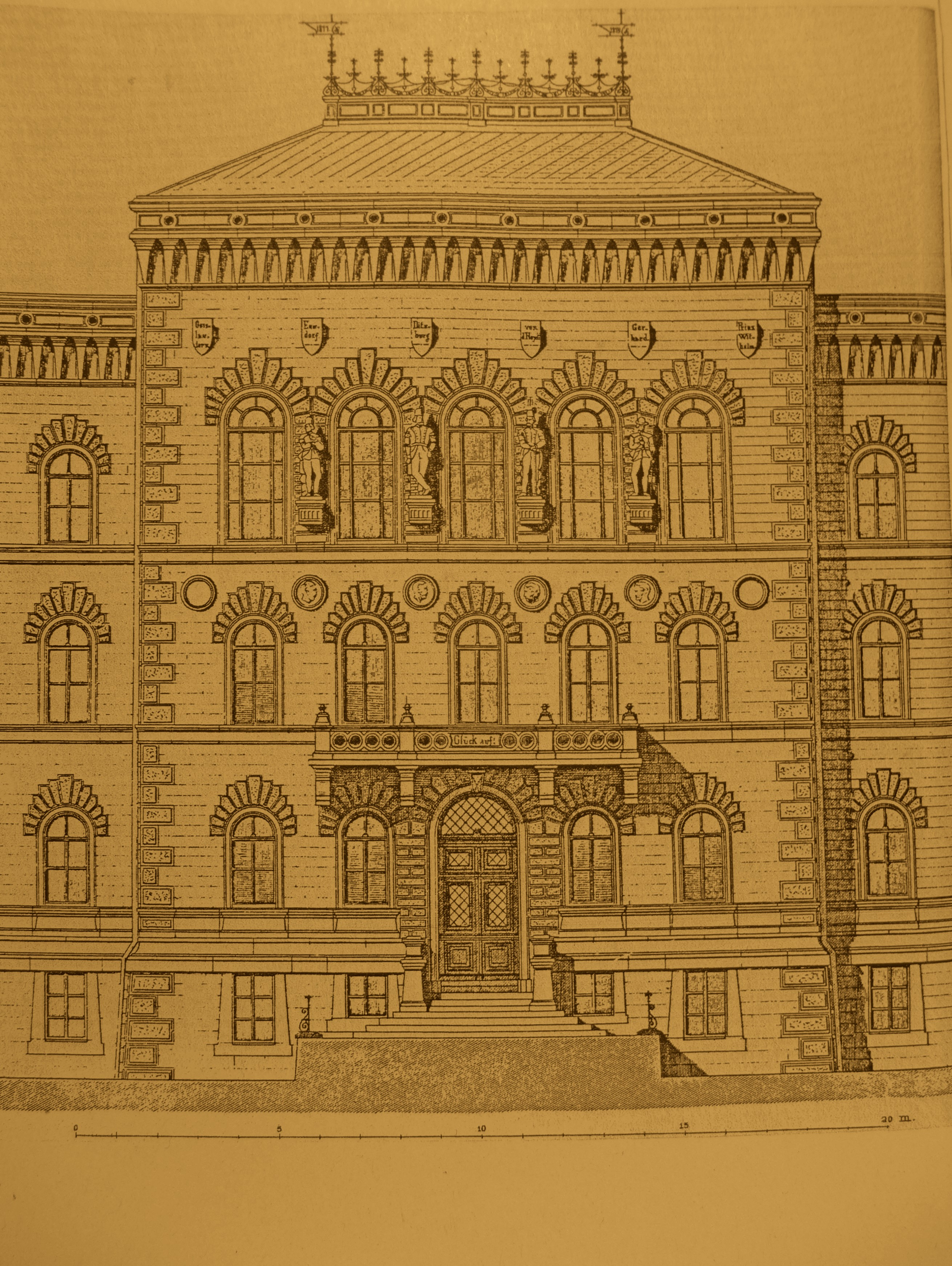 Bergwerksdirektion Saarbrücken, Fassadenriss des Mittelpavillons (Atlas der Zeitschrift für Bauwesen, 32. Jg., 1882, Blatt 57)